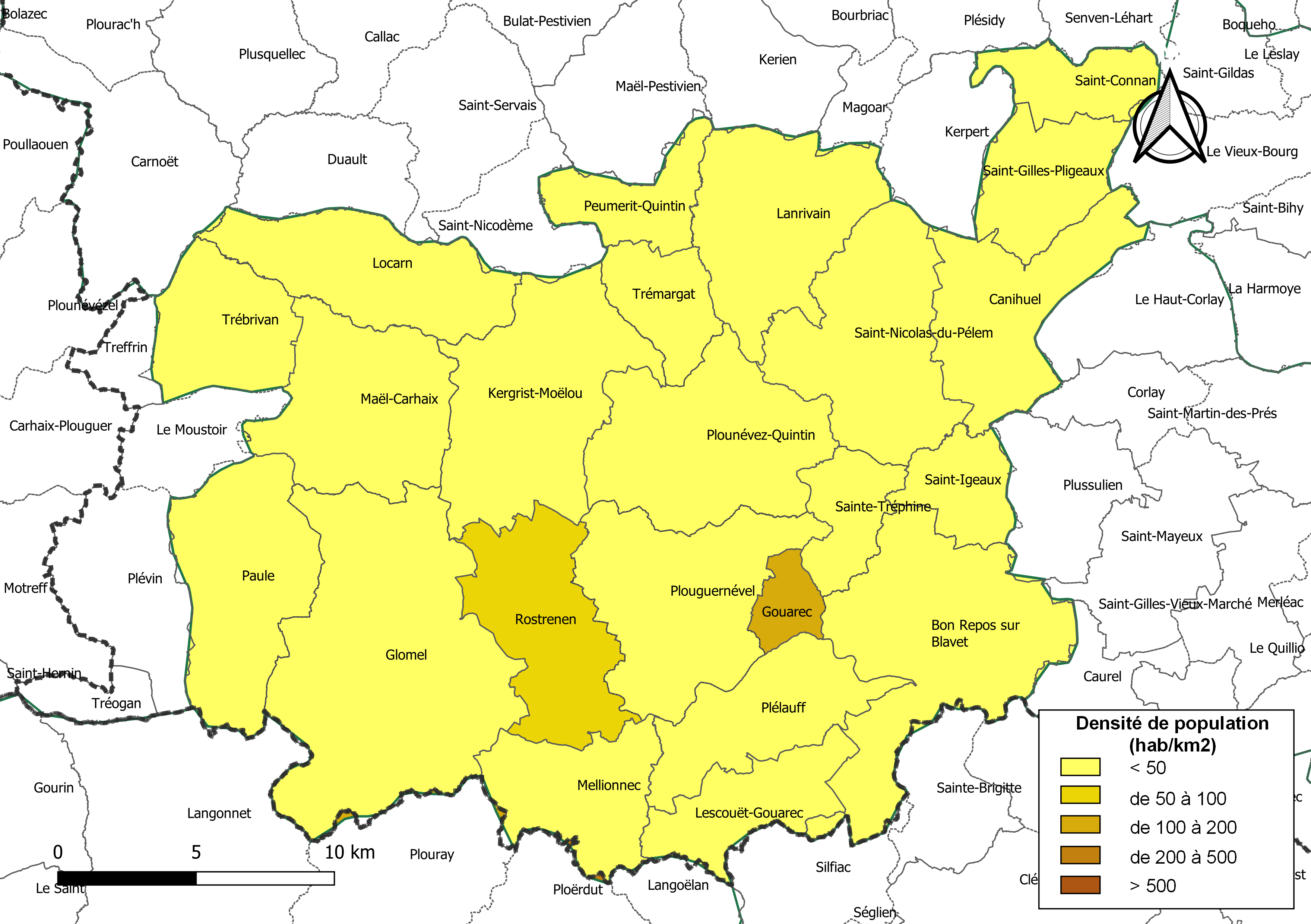 Carte des densités de population (millésimée 2016) des communes de la Communauté de communes du Kreiz-Breizh, département des Côtes-d'Armor, France. Composition au 1er janvier 2019.